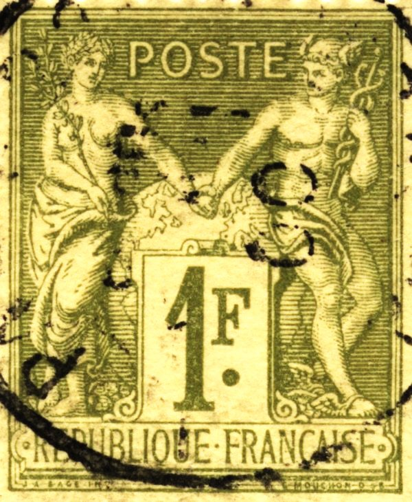 Timbre français type Sage, 1 F.